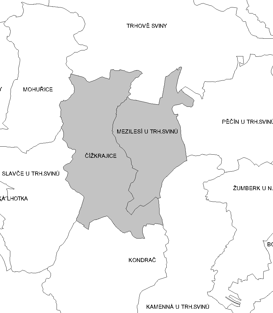 Katastrální členění Čížkrajic